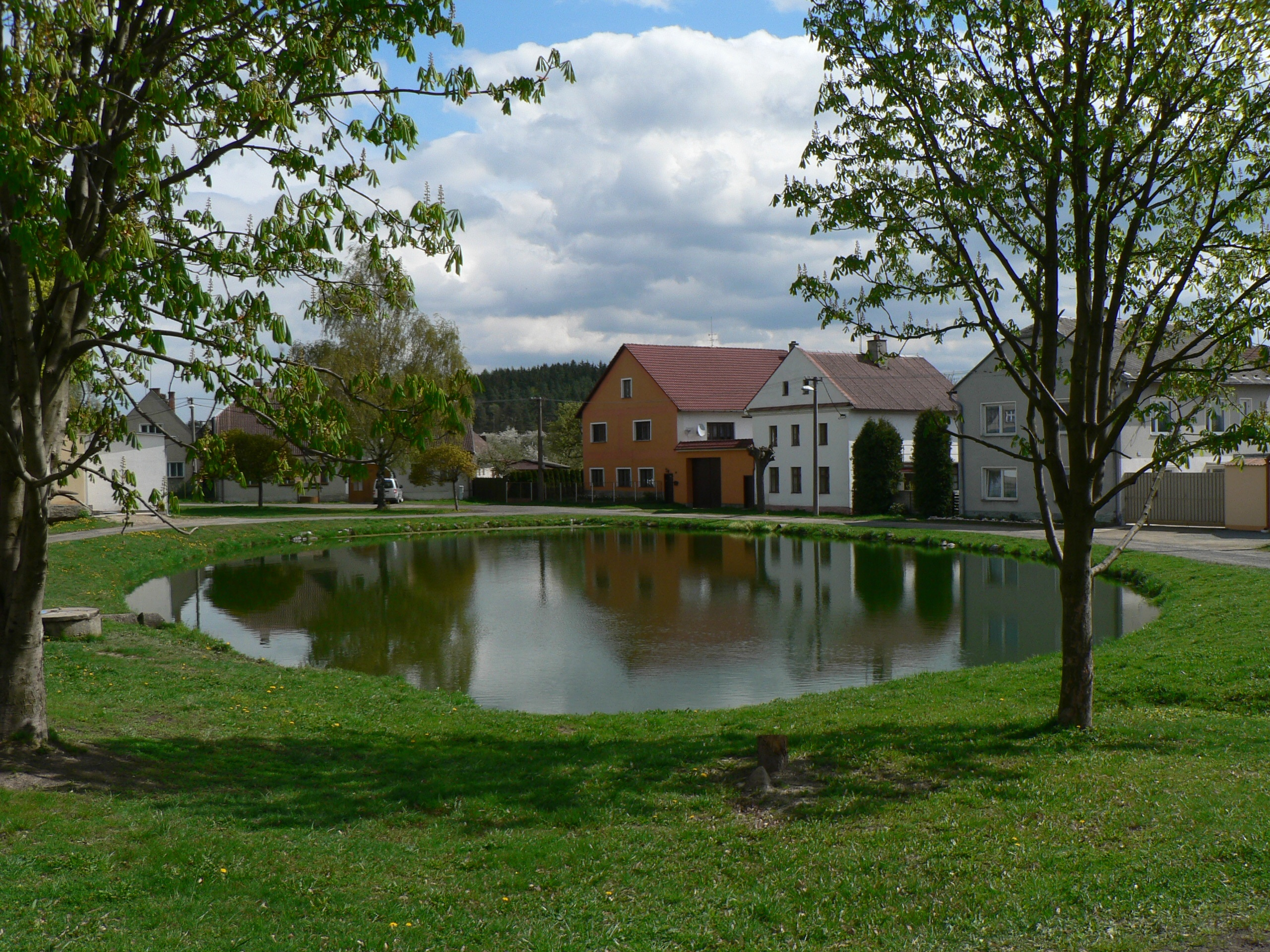 Náves v Pavlově.